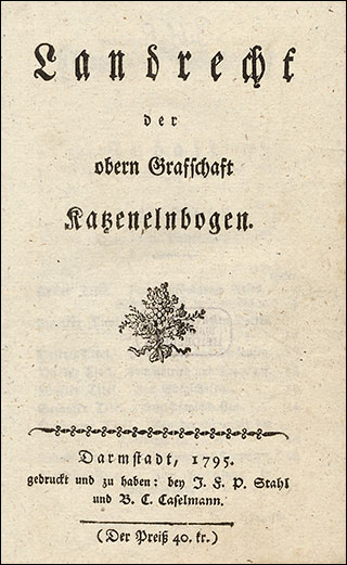 Front page of Landrecht der obern Grafschaft Katzenelnbogen